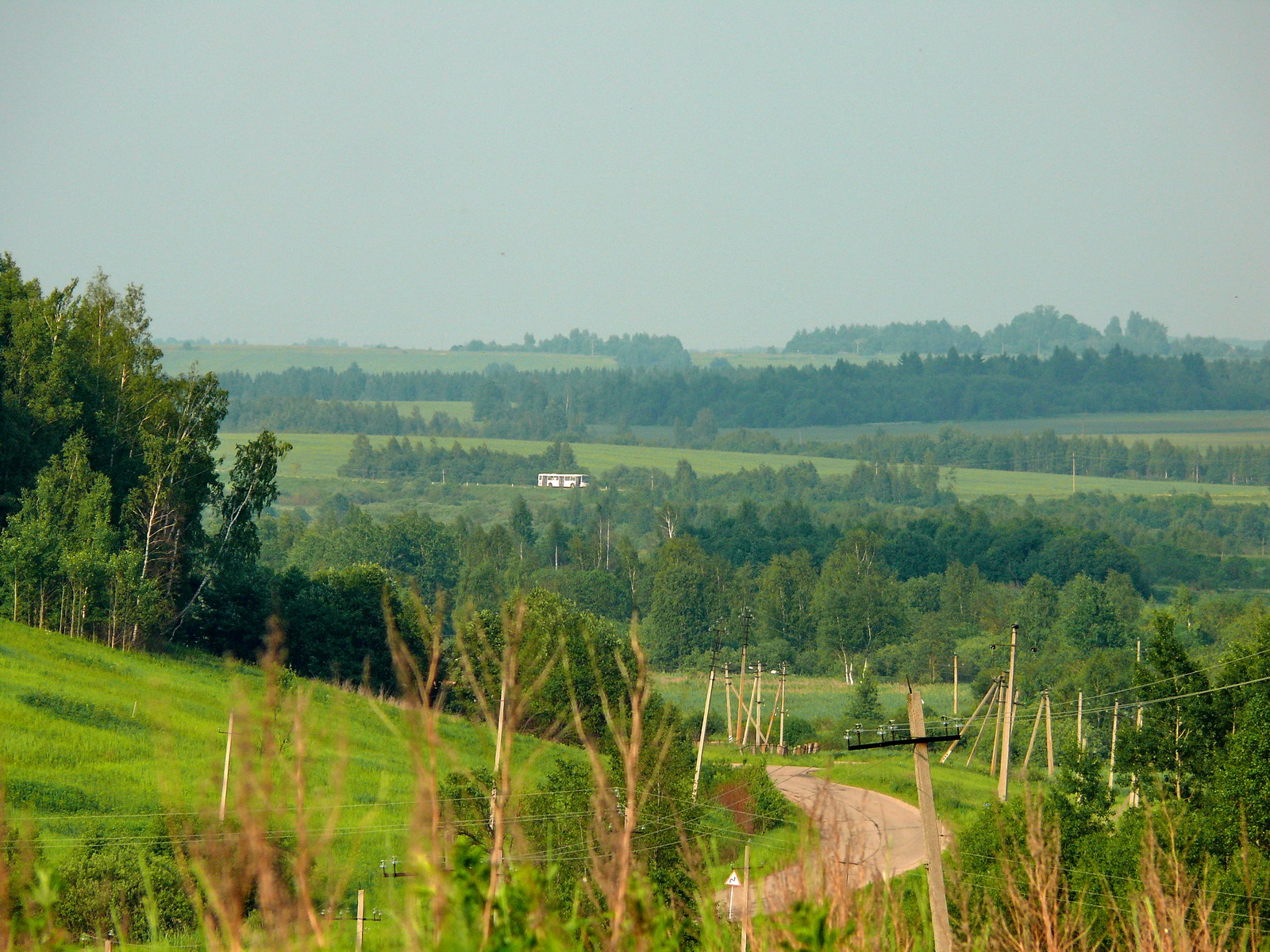 Даль...